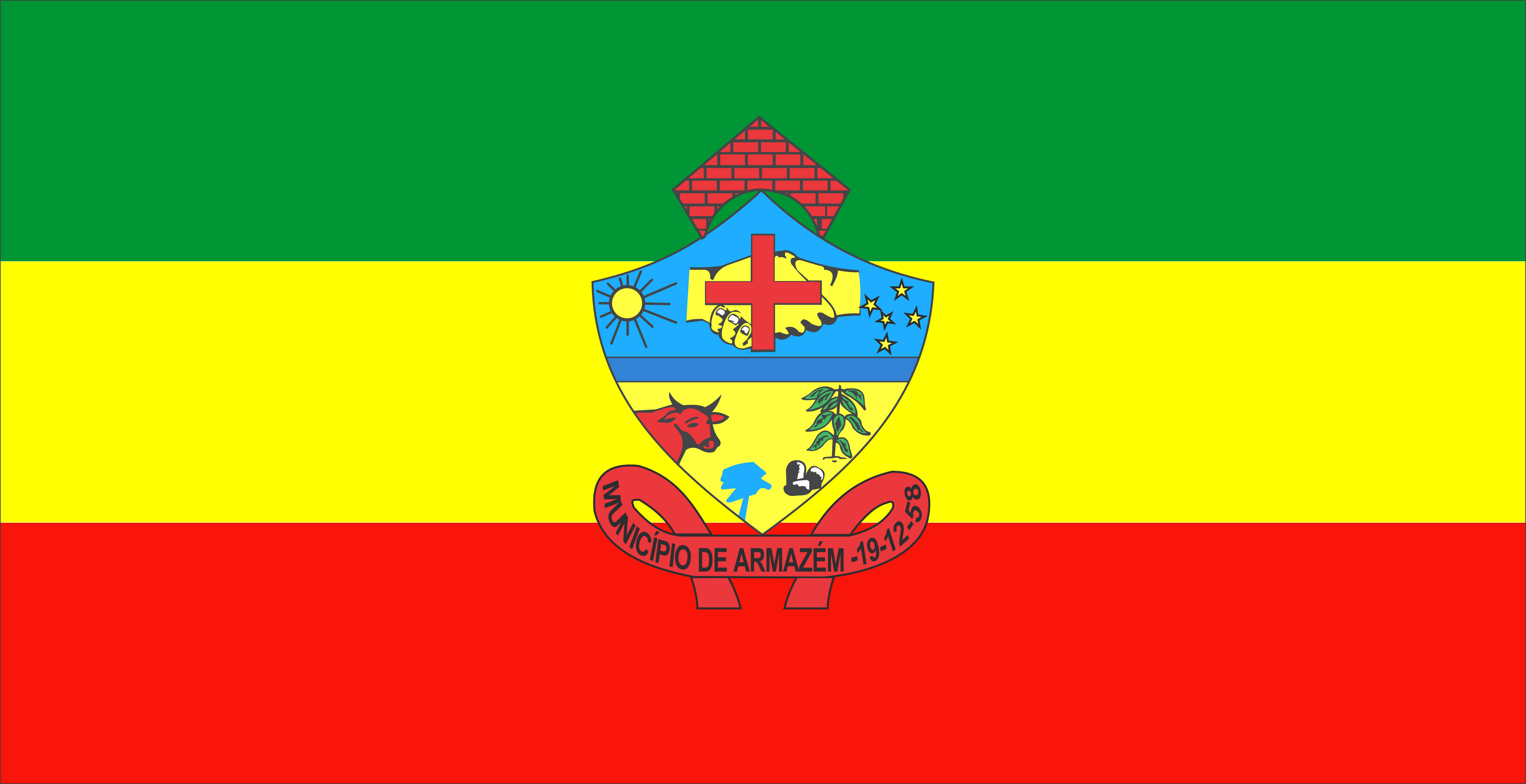 Bandeira do município de Armazém, estado de Santa Catarina no Brasil.